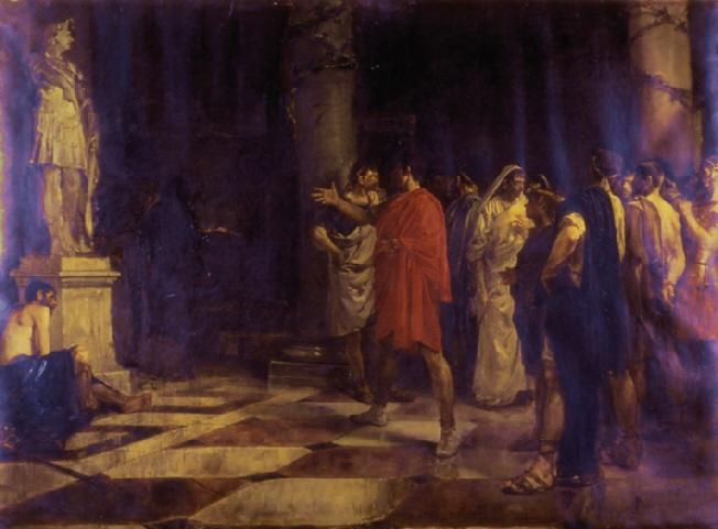 Julio César ante la estatua de Alejandro en el templo de Hércules en Cádiz, José Morillo y Ferradas, 1894, Museo de Cádiz. Ficha en CERES